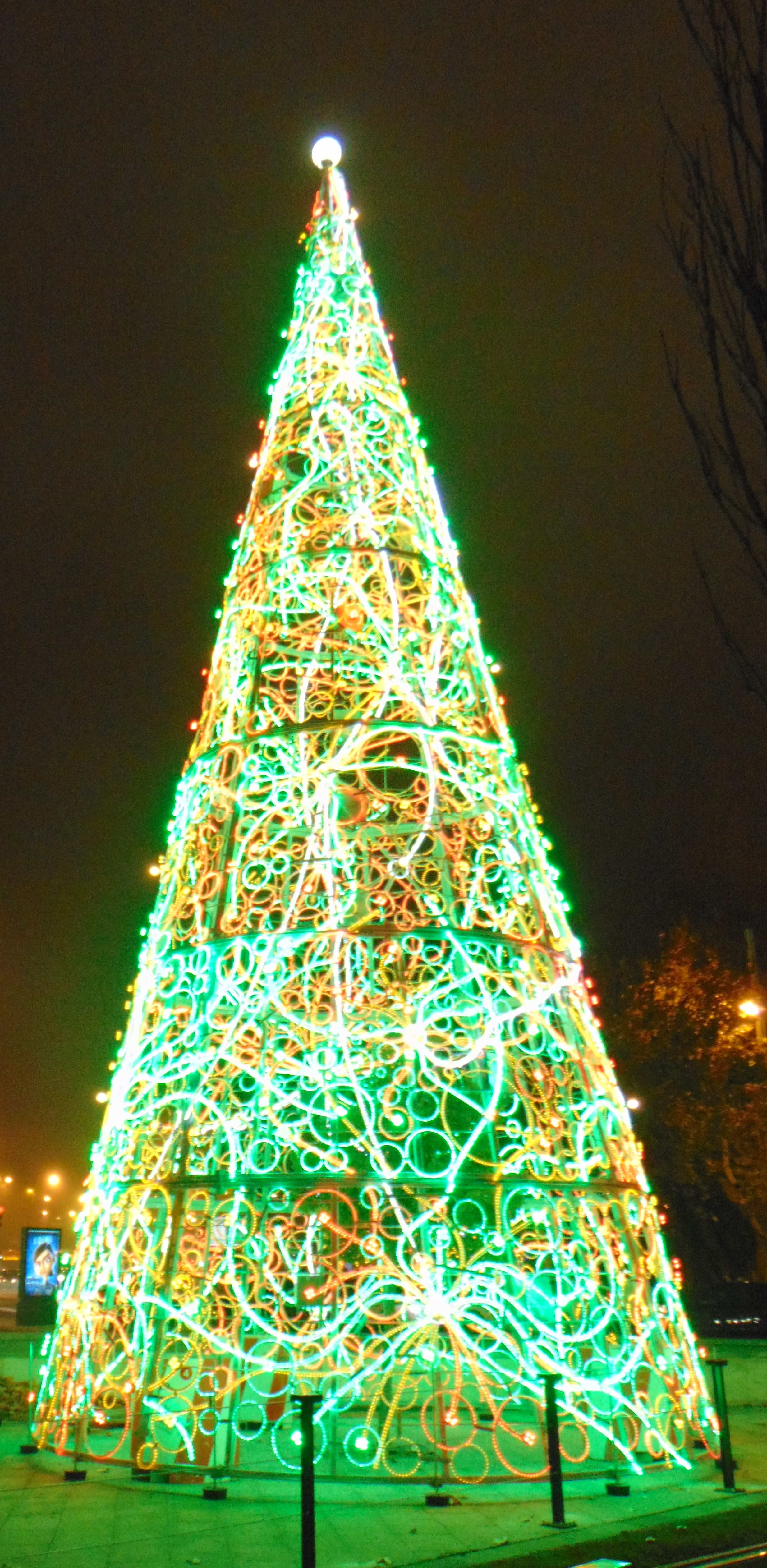 Árbol de Navidad en la Plaza Paraíso de Zaragoza (España).